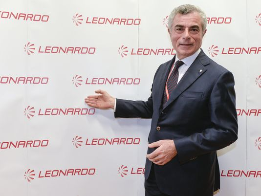 Mauro Moretti